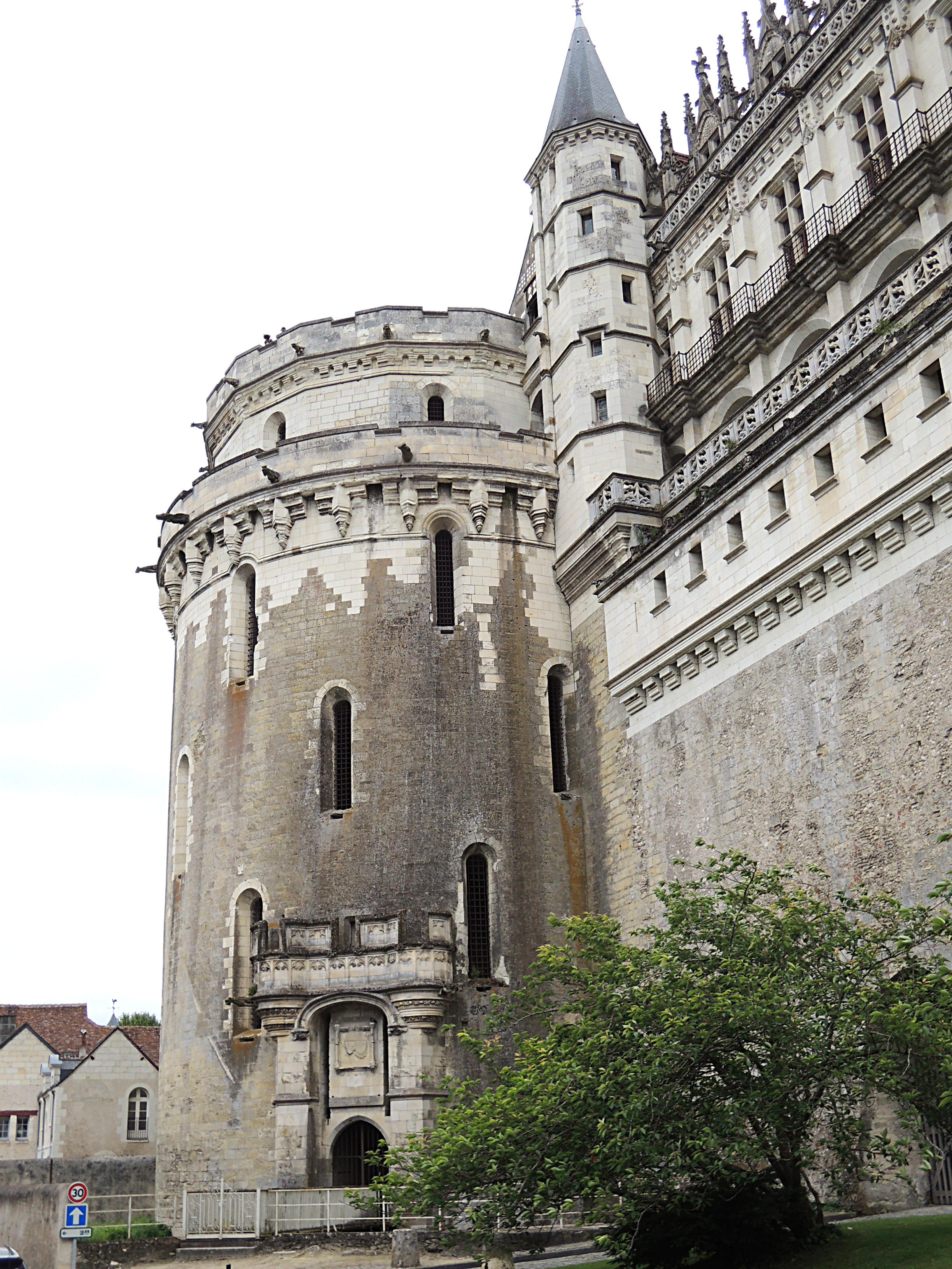 Schloss Amboise, Minimes-Turm